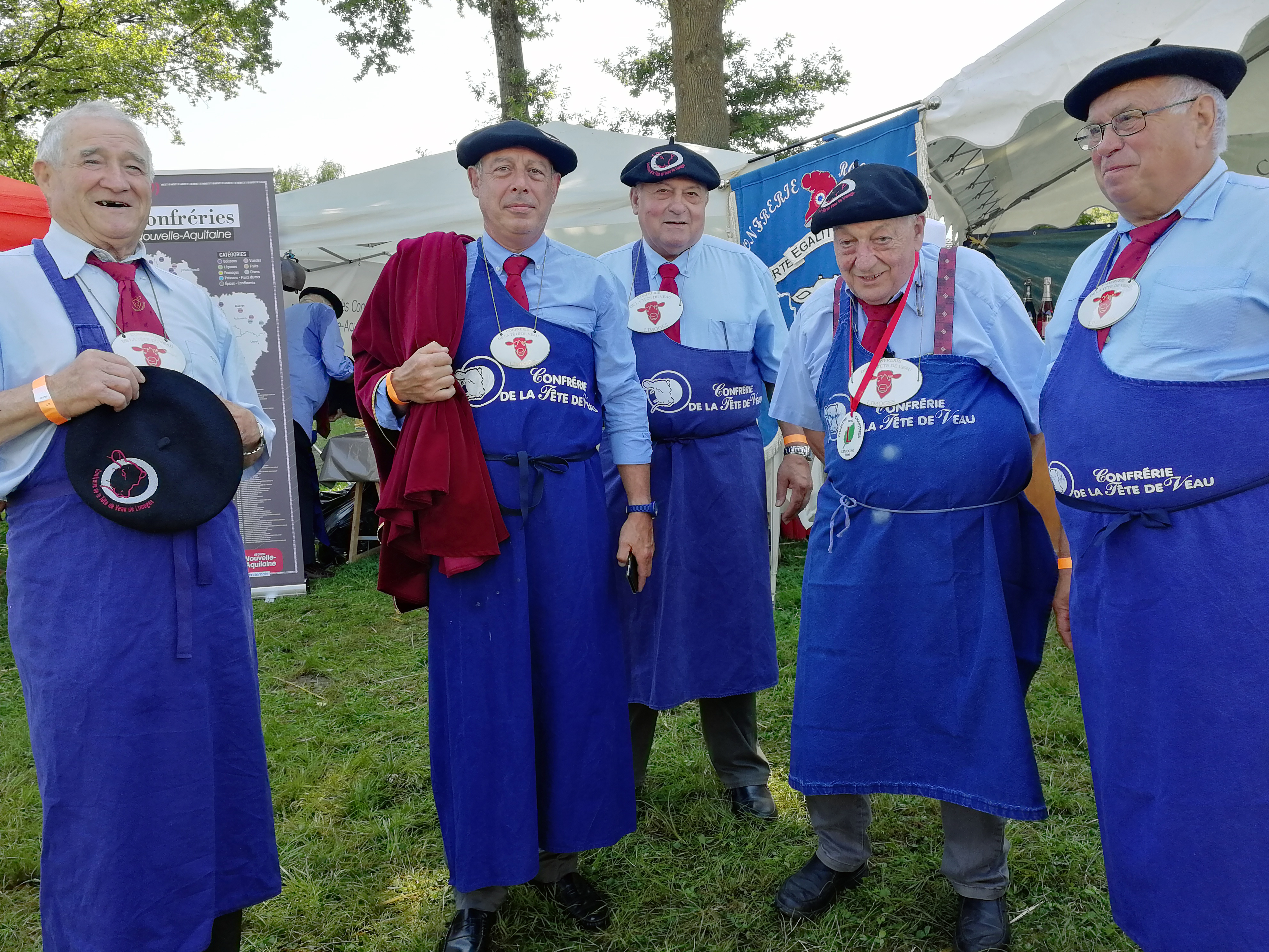 Cinq membres de la Confrérie rochelaise de la tête de veau au Championnat du monde de tonte de moutons au Dorat en Haute-Vienne.